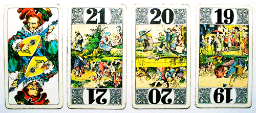 Cego Kartenspiel: 4 ausgewählte Trümpfe